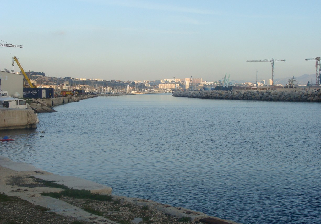 L'amorce du canal de Marseille au Rhône à l'Estaque, vue prise depuis le port de la Lave en direction de l'Estaque. A gauche, la digue à la mer.